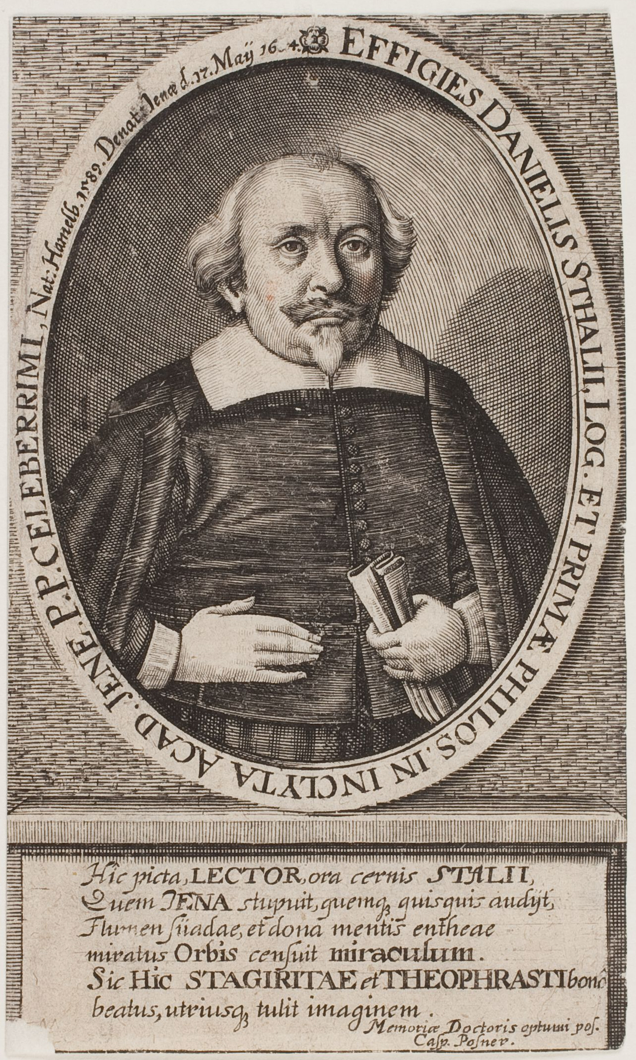 Bildnis Daniel Stahl (1589–1654), Professor in Jena, Kupferstich, 140 x 84 mm